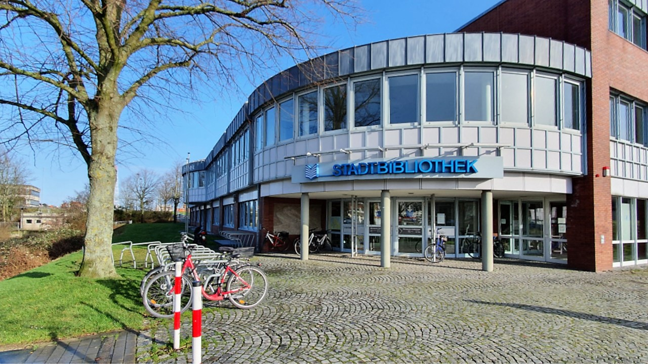 Eingangsbereich der Stadtbibliothek Cuxhaven Kapitän-Alexander-Straße 1